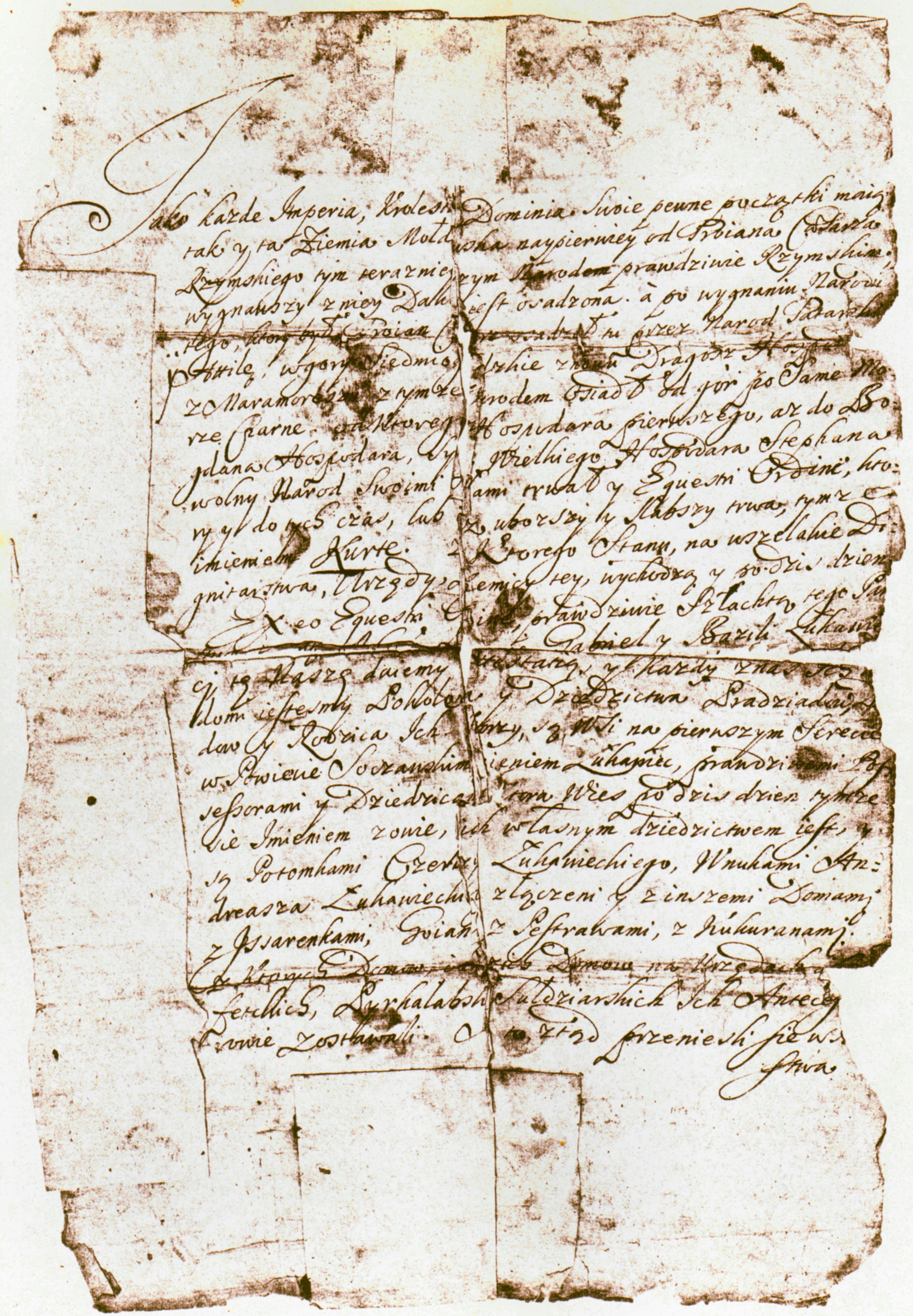 Urkunde vom 24. Januar 1681 - 1, Bestätigung, dass große Bojarenfamilie